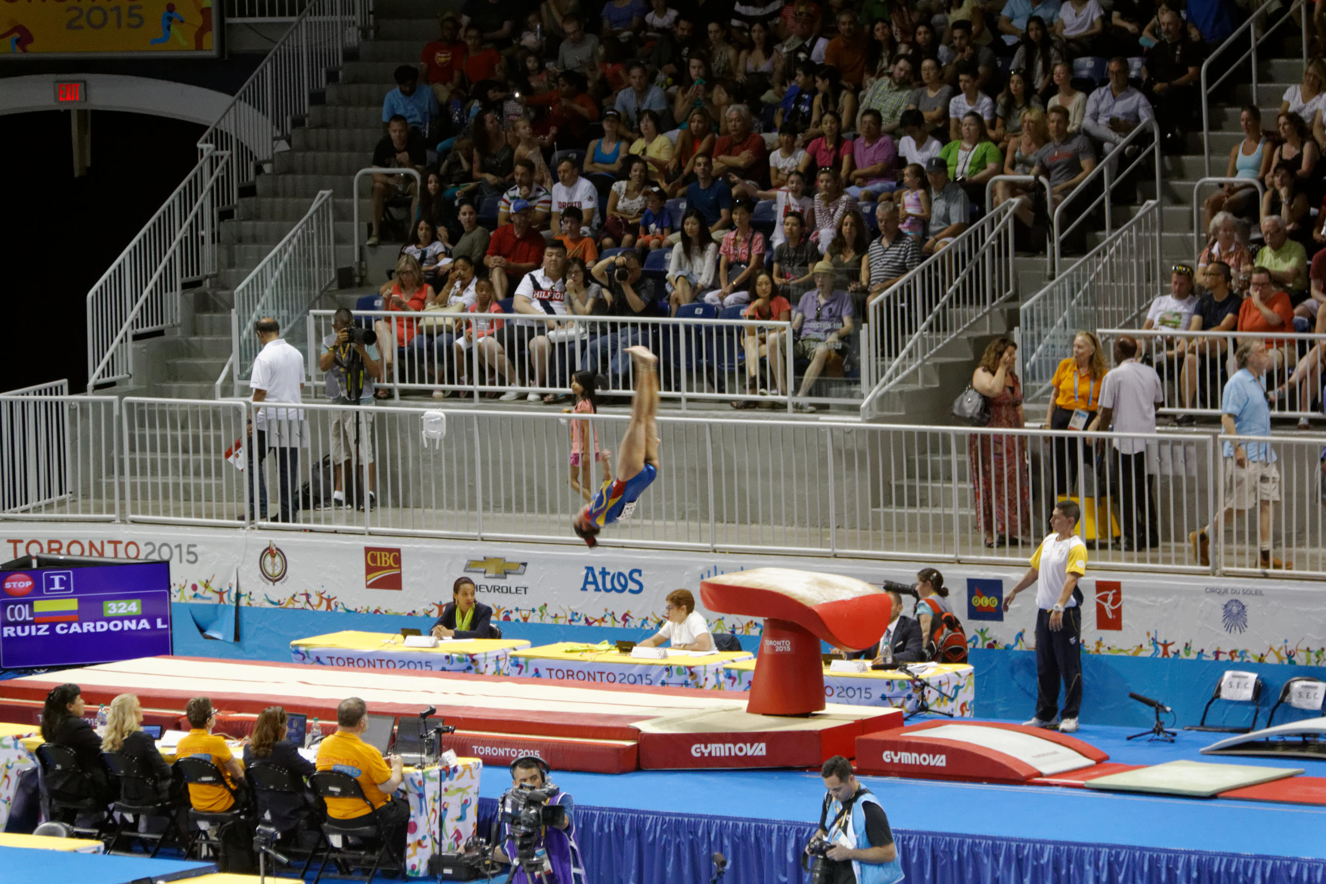 Vault 4